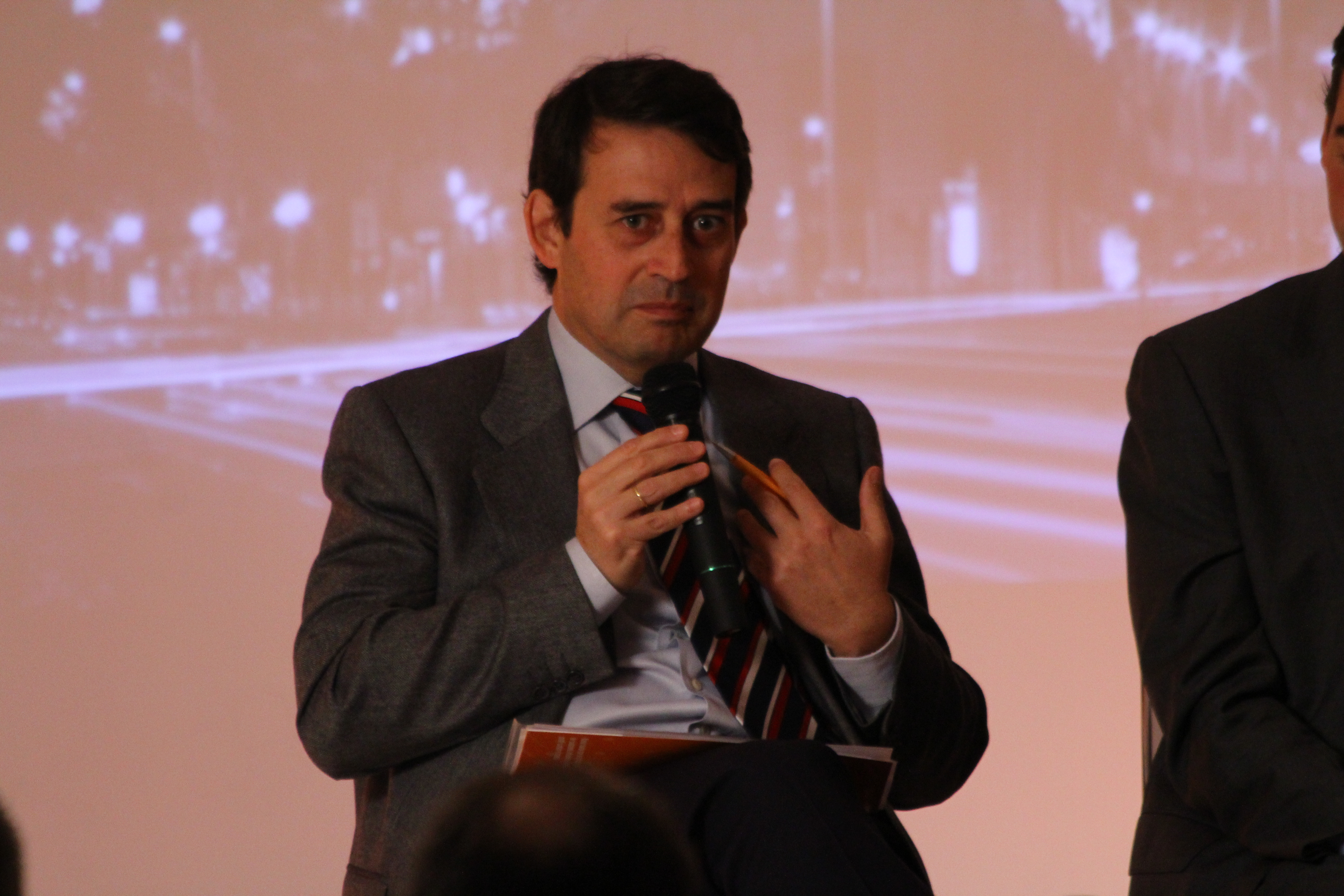 José Luis Requero, juez y exmiembro del Consejo General del Poder Judicial.